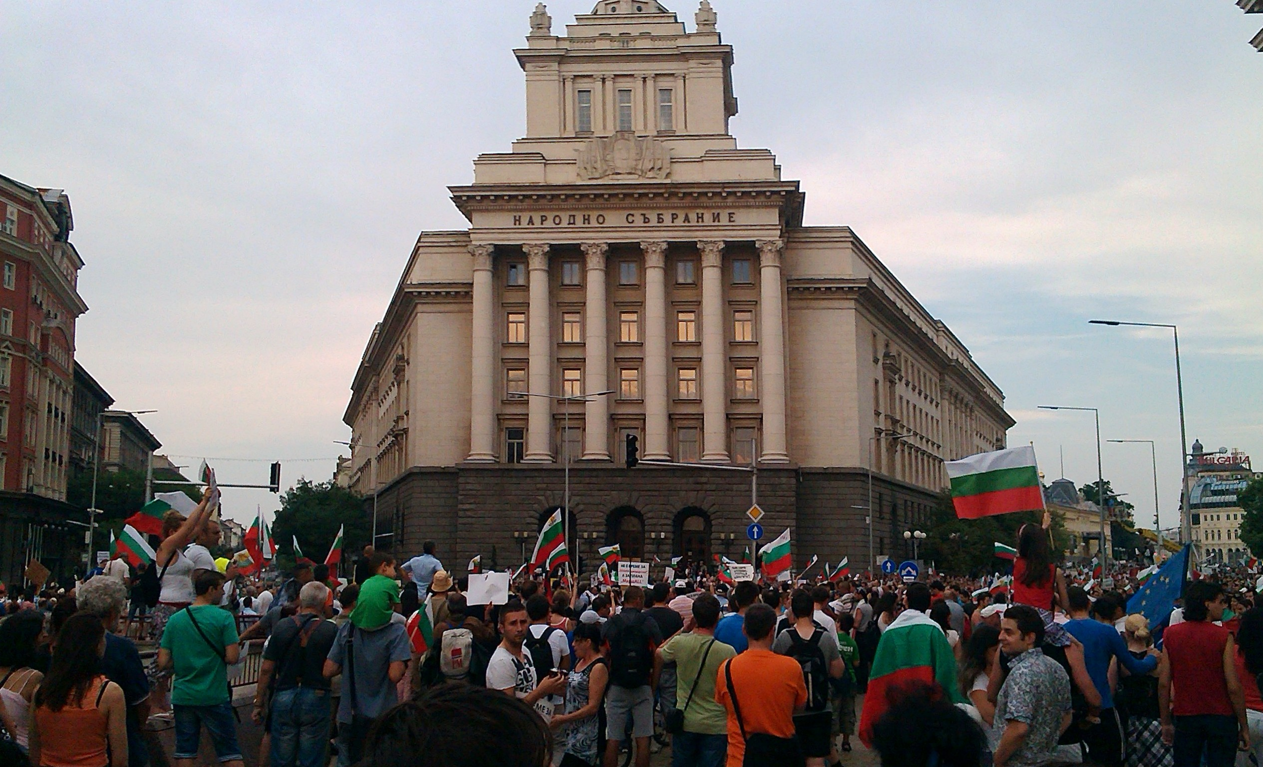 Антиправителствени протести в София. 21 юли 2013 г.